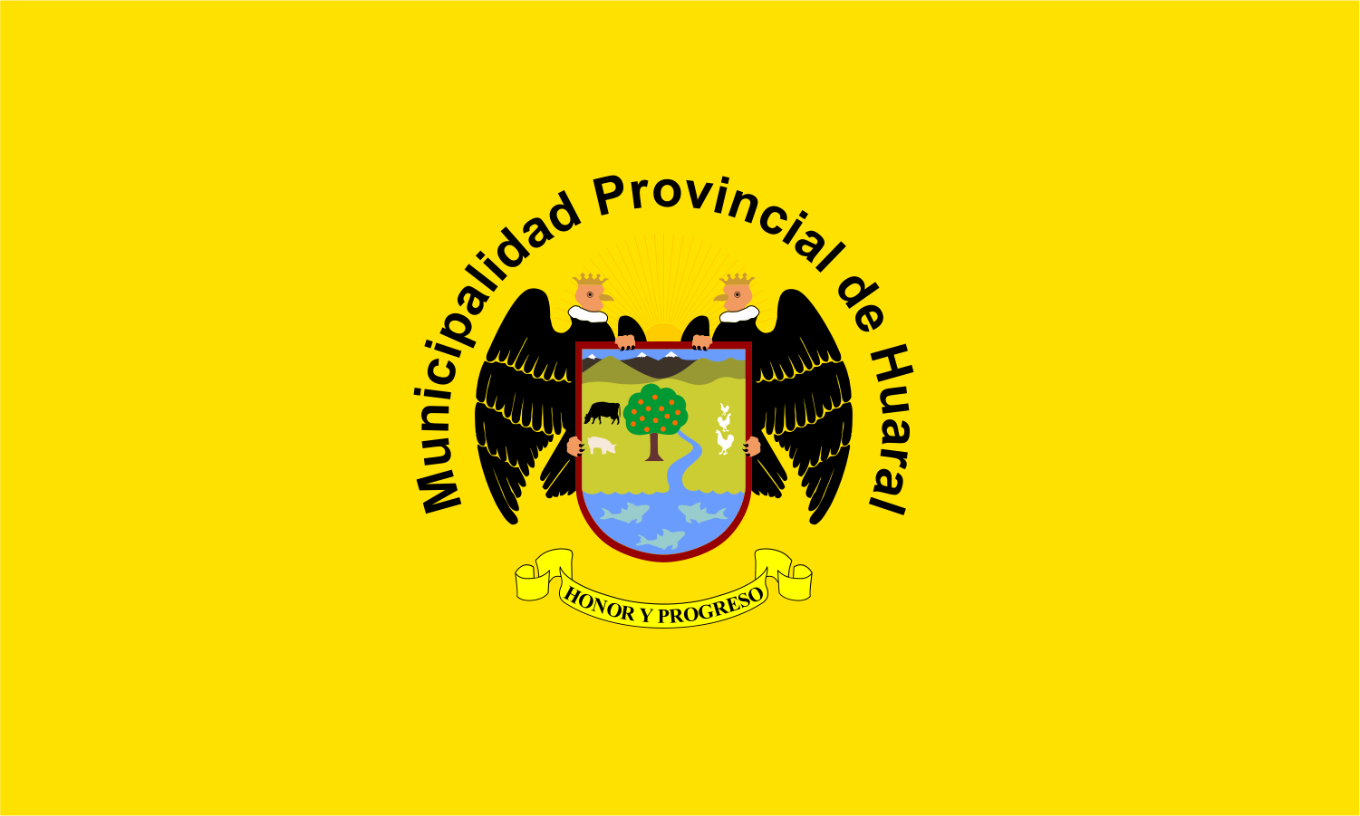 bandera actual